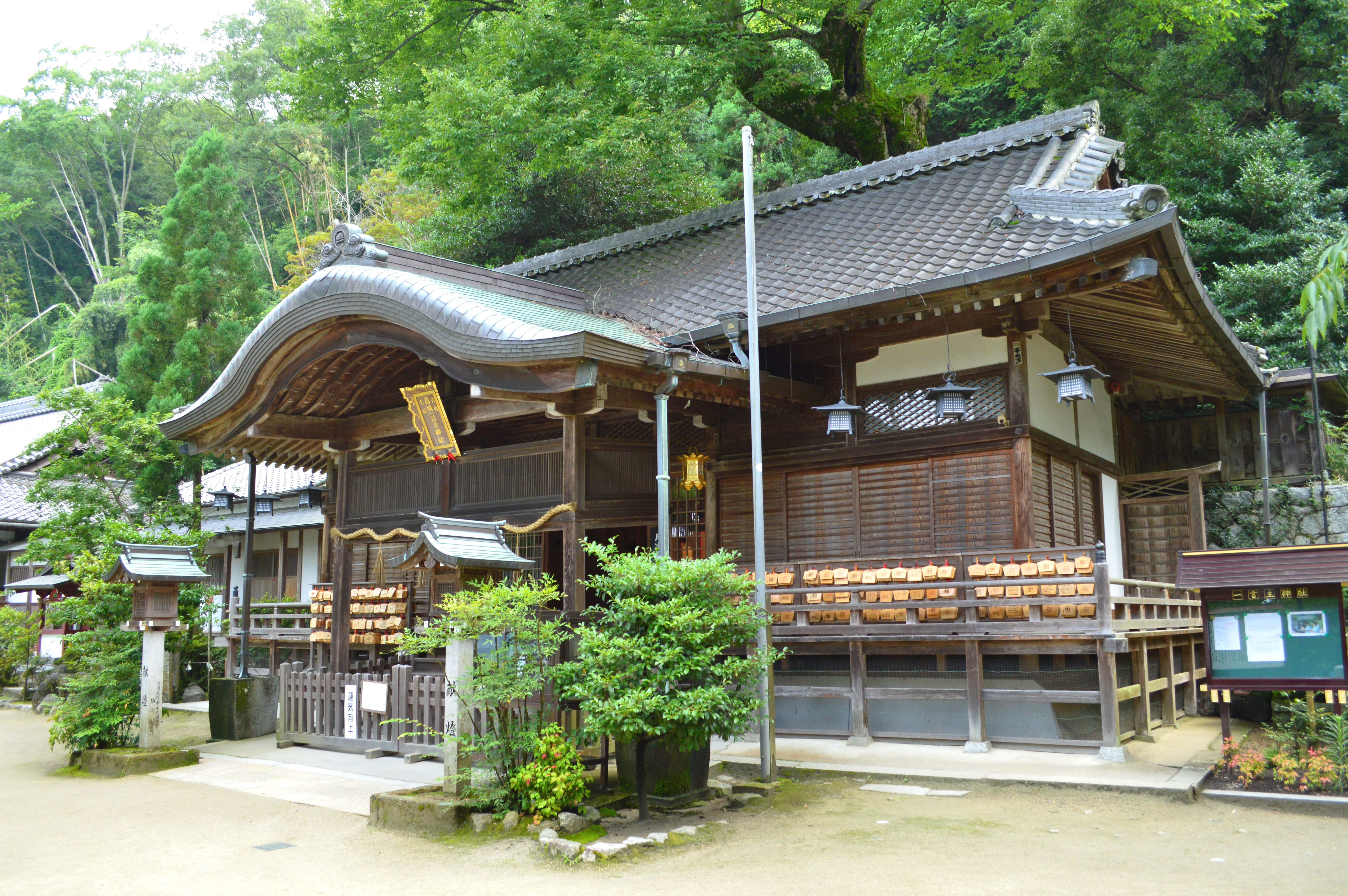 葛城一言主神社 拝殿